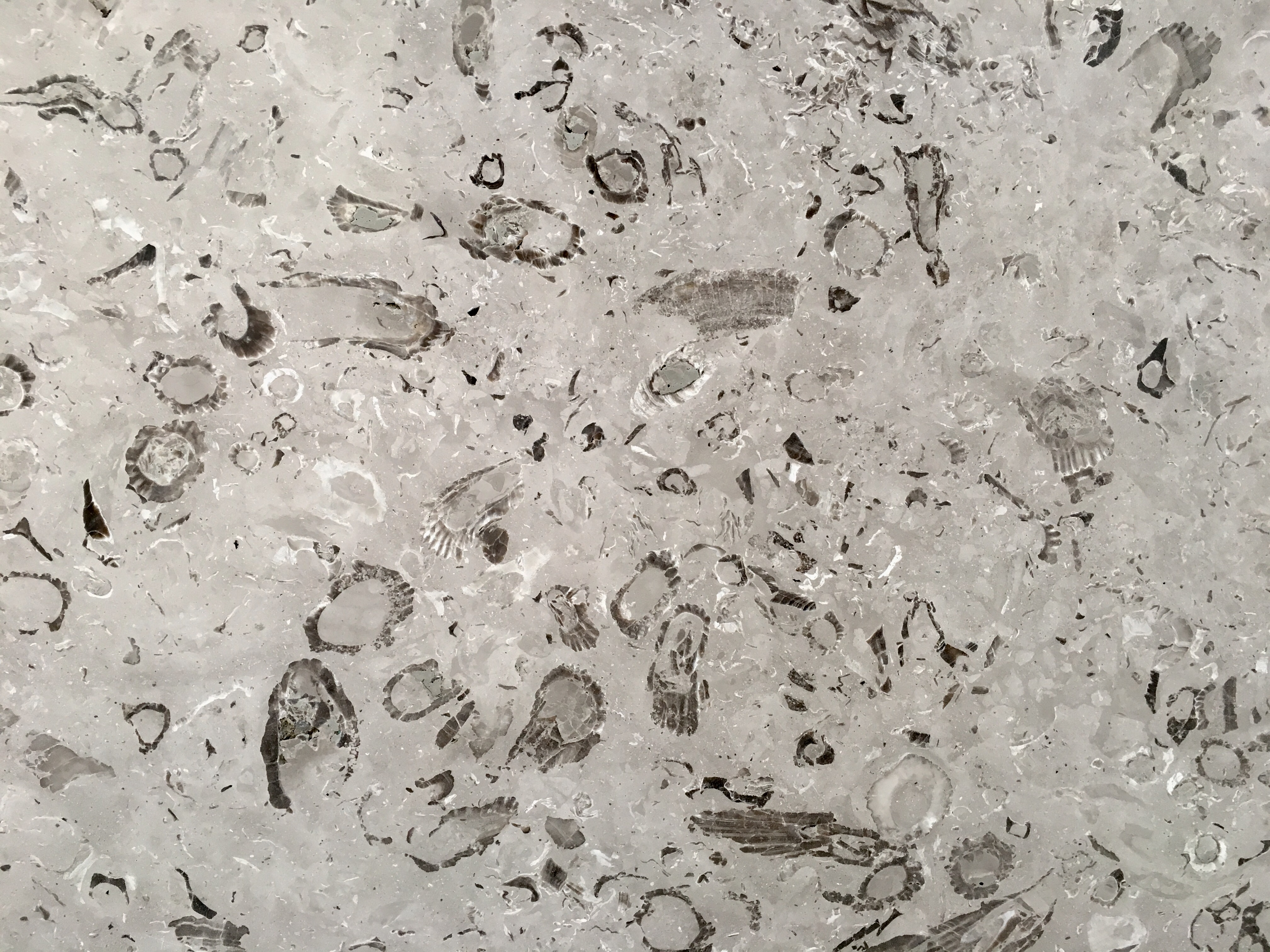 Dettaglio marmo Aurisina Lumachella